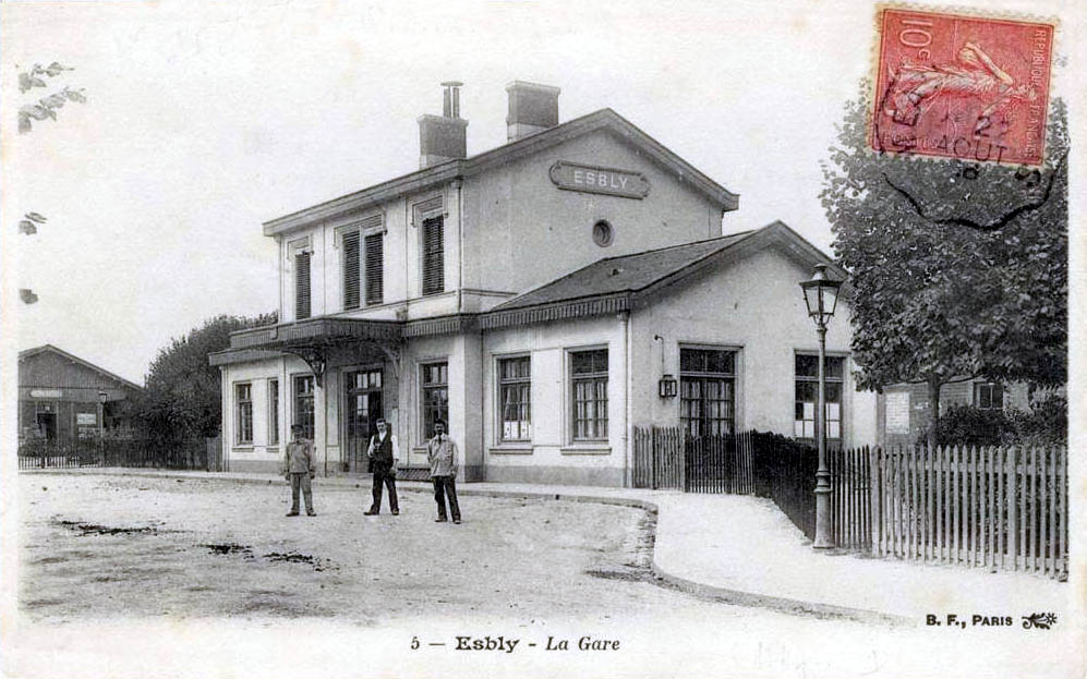 La gare d'Esbly, Seine-et-Marne, France.